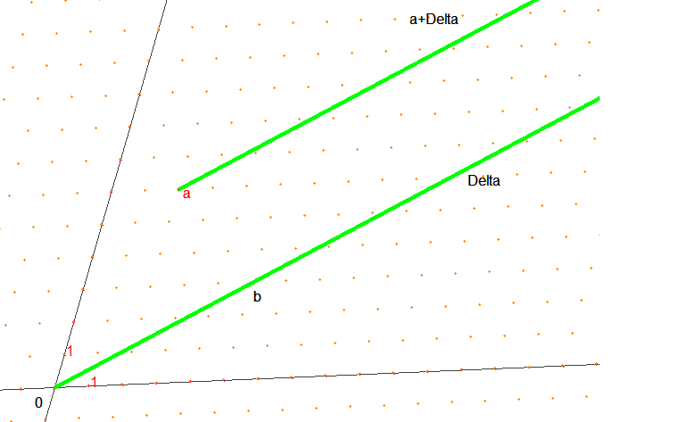 demi-droite et demi-droite vectorielle associée(créé sous cabri)